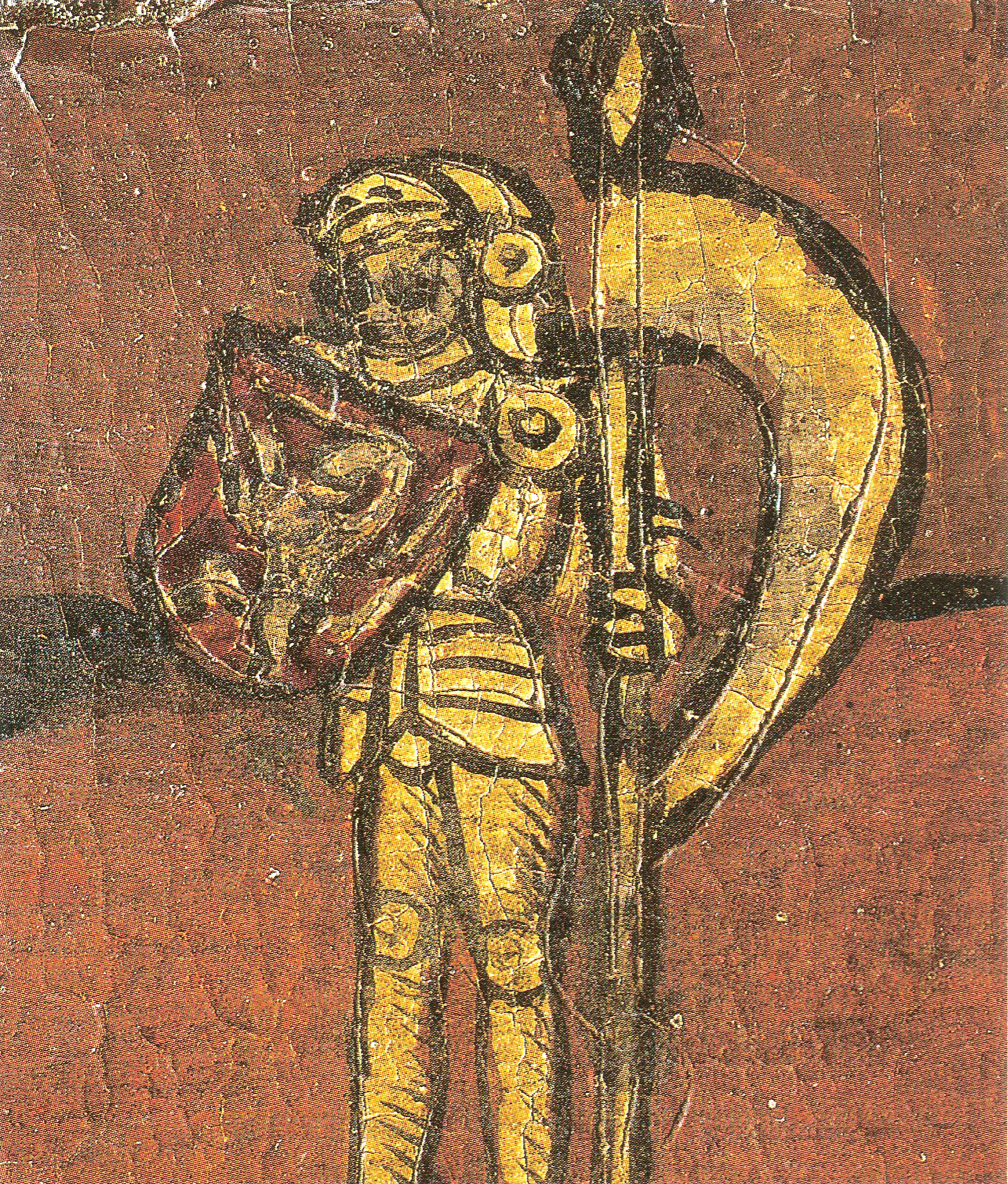 Älteste farbige Darstellung des Wappens der Stadt Schwäbisch Gmünd. Detail eines Tafelgemäldes von 1480, aufgefunden 1913